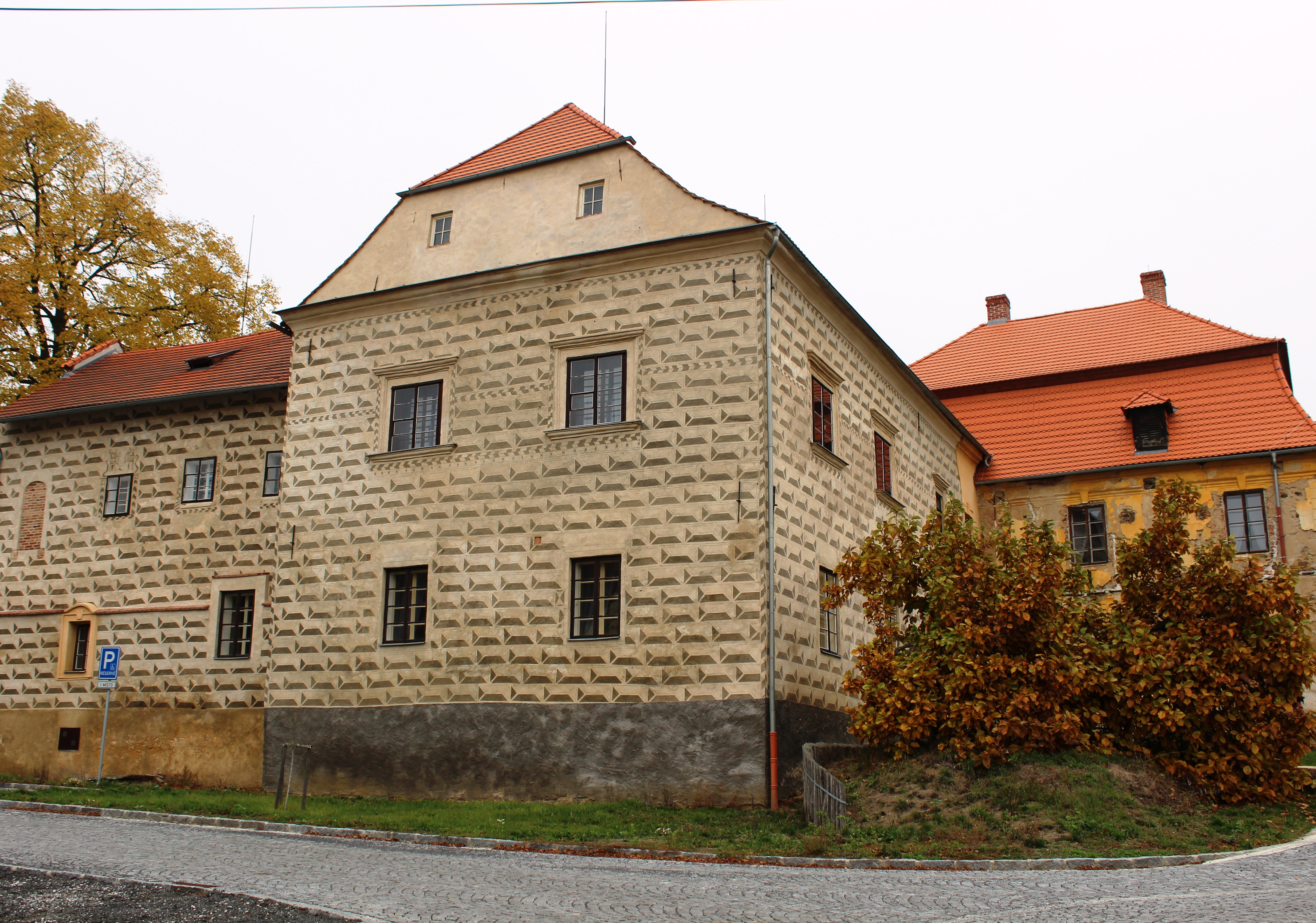 Starý zámek. Chudenice. Okres Klatovy. Česká republika.